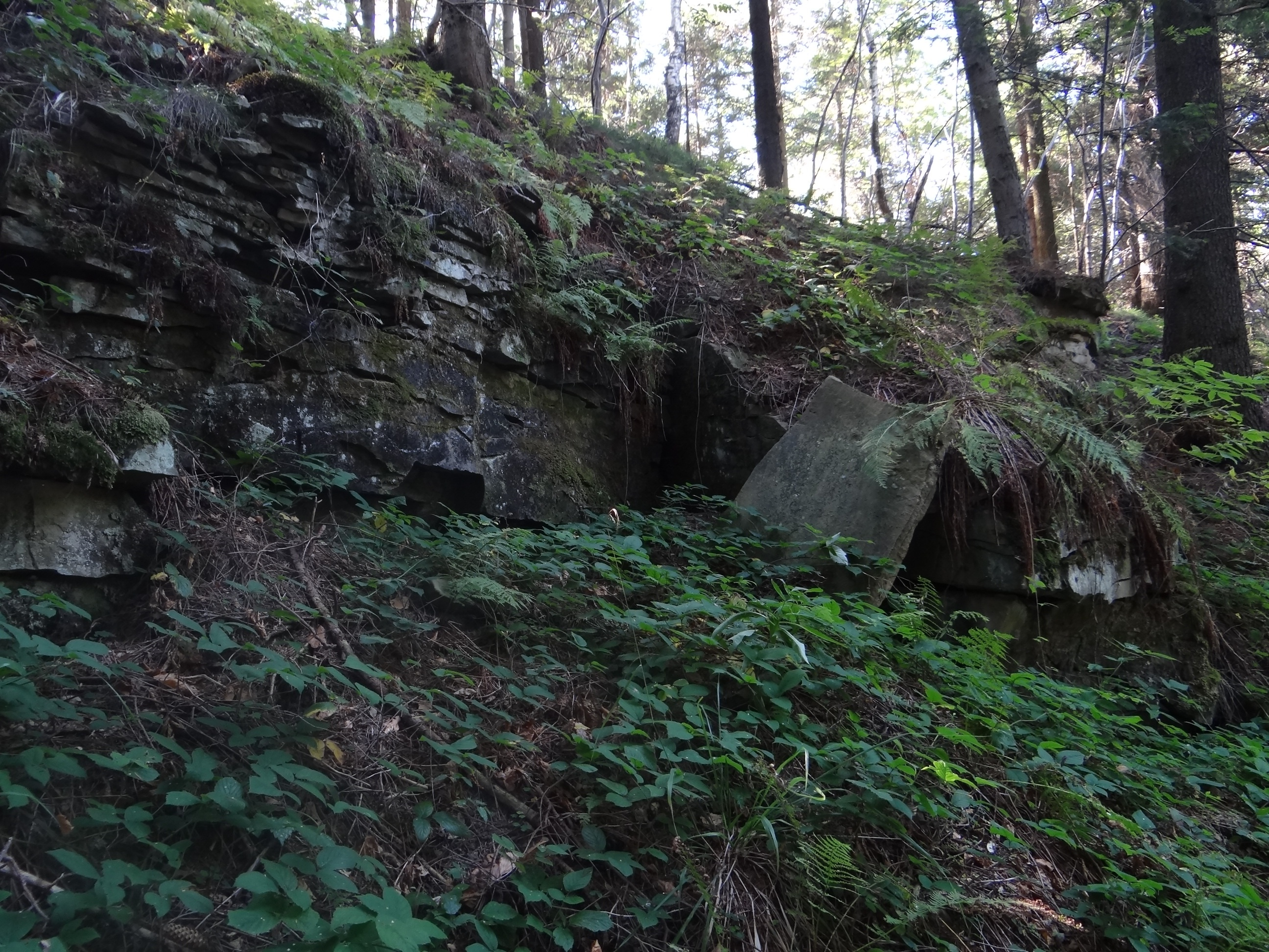 Czartorysko